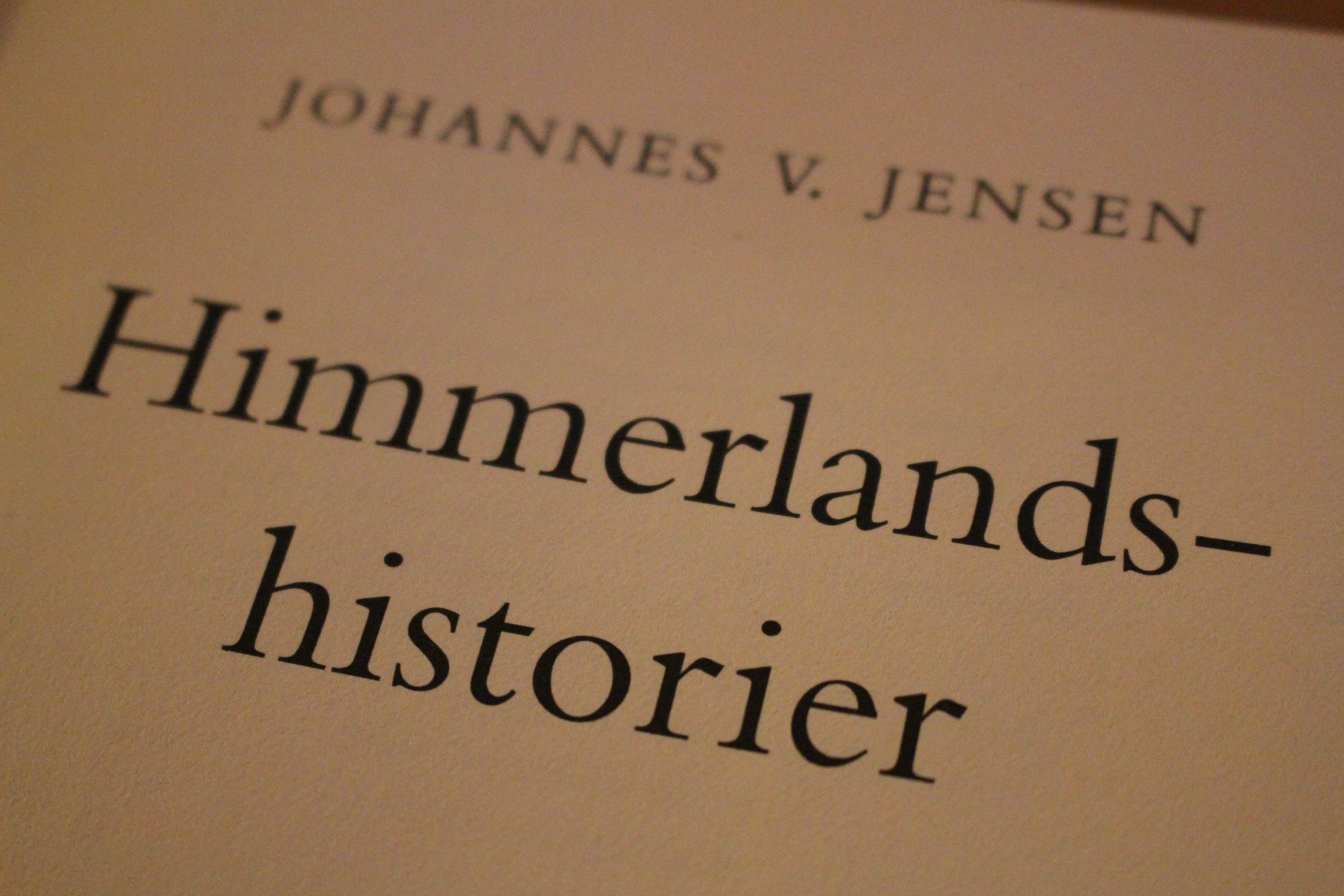 Titelblad fra Himmerlandshistorier af Johannes V. Jensen